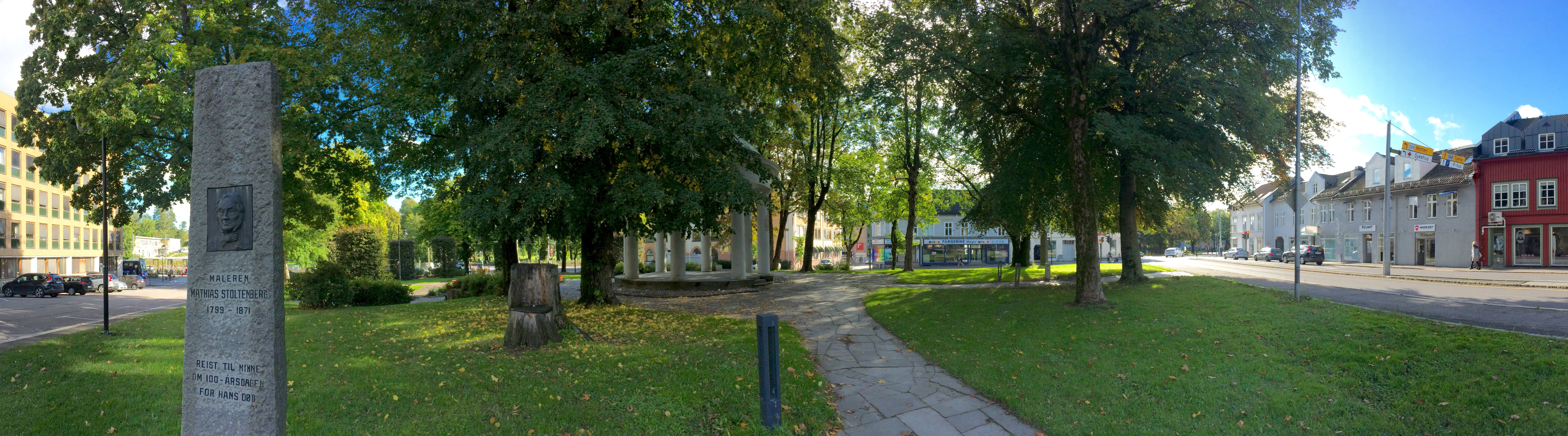 Minnestøtte/bauta reist over maleren Mathias Stoltenberg i Stoltenbergparken i Tønsberg i Vestfold. Beskåret, fortegnet pranoramabilde. 25. september 2015